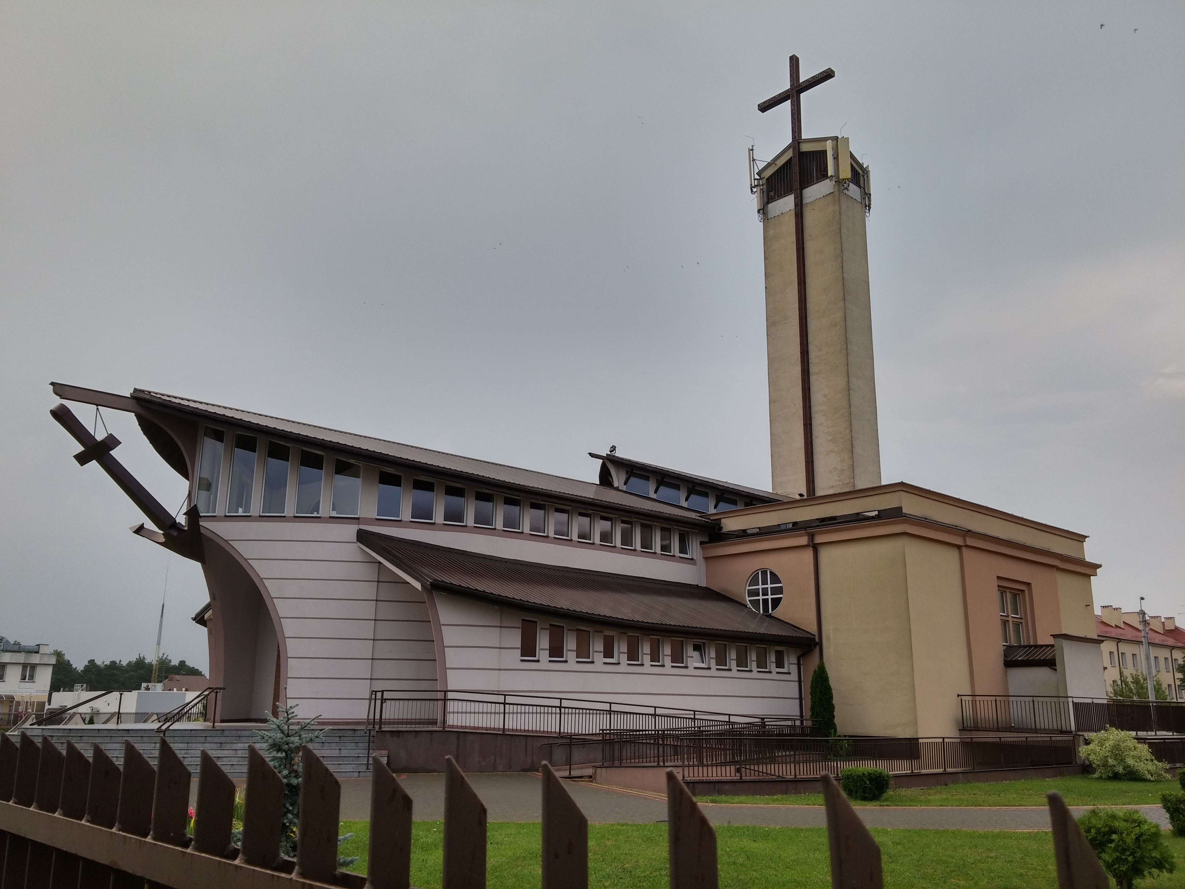 Kościół pod wezwaniem Jezusa Miłosiernego w Czarnej Białostockiej